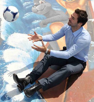 축구선수 사샤, 호주관 팝업 체험관 방문